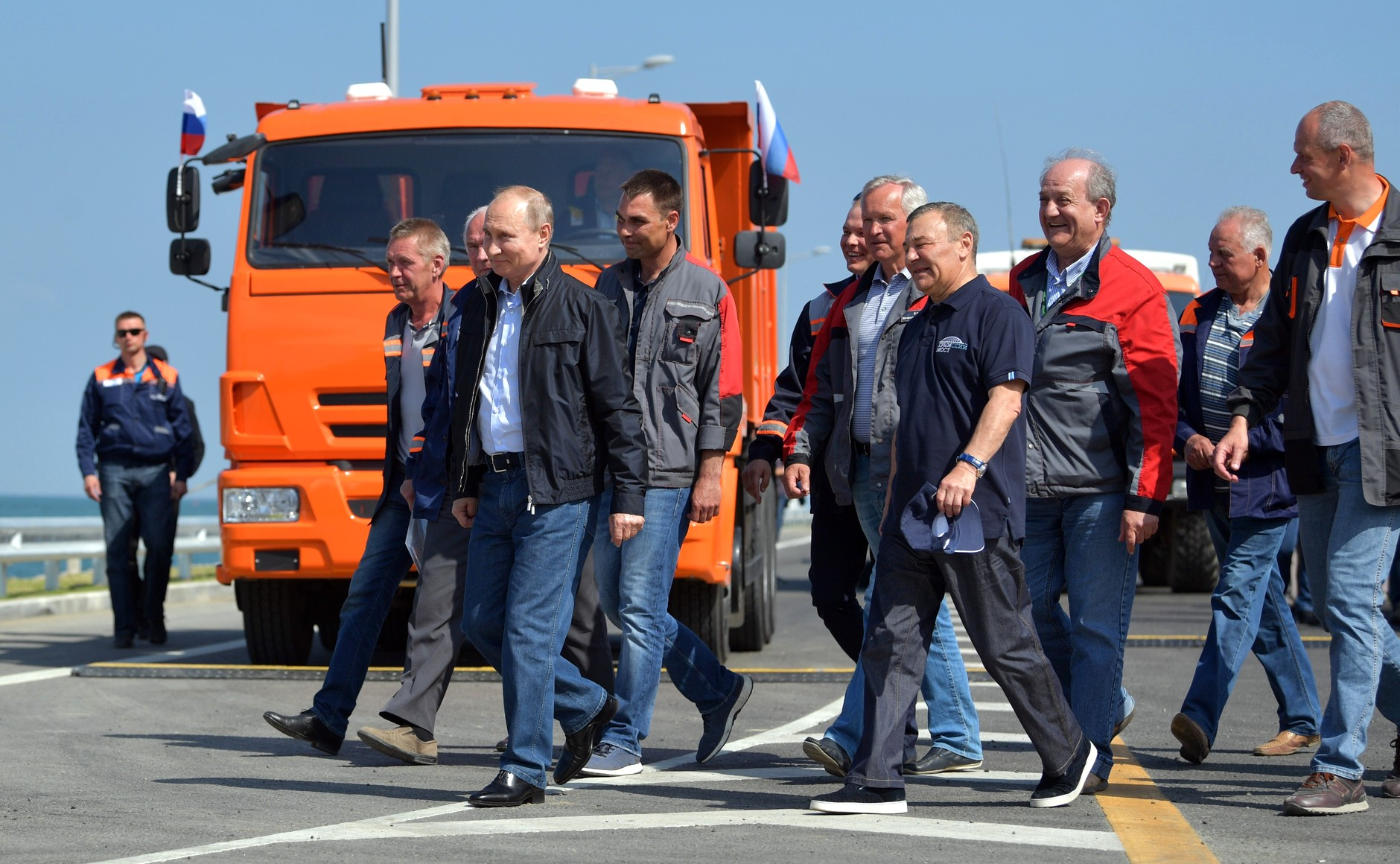 Открытие автодорожной части Крымского моста